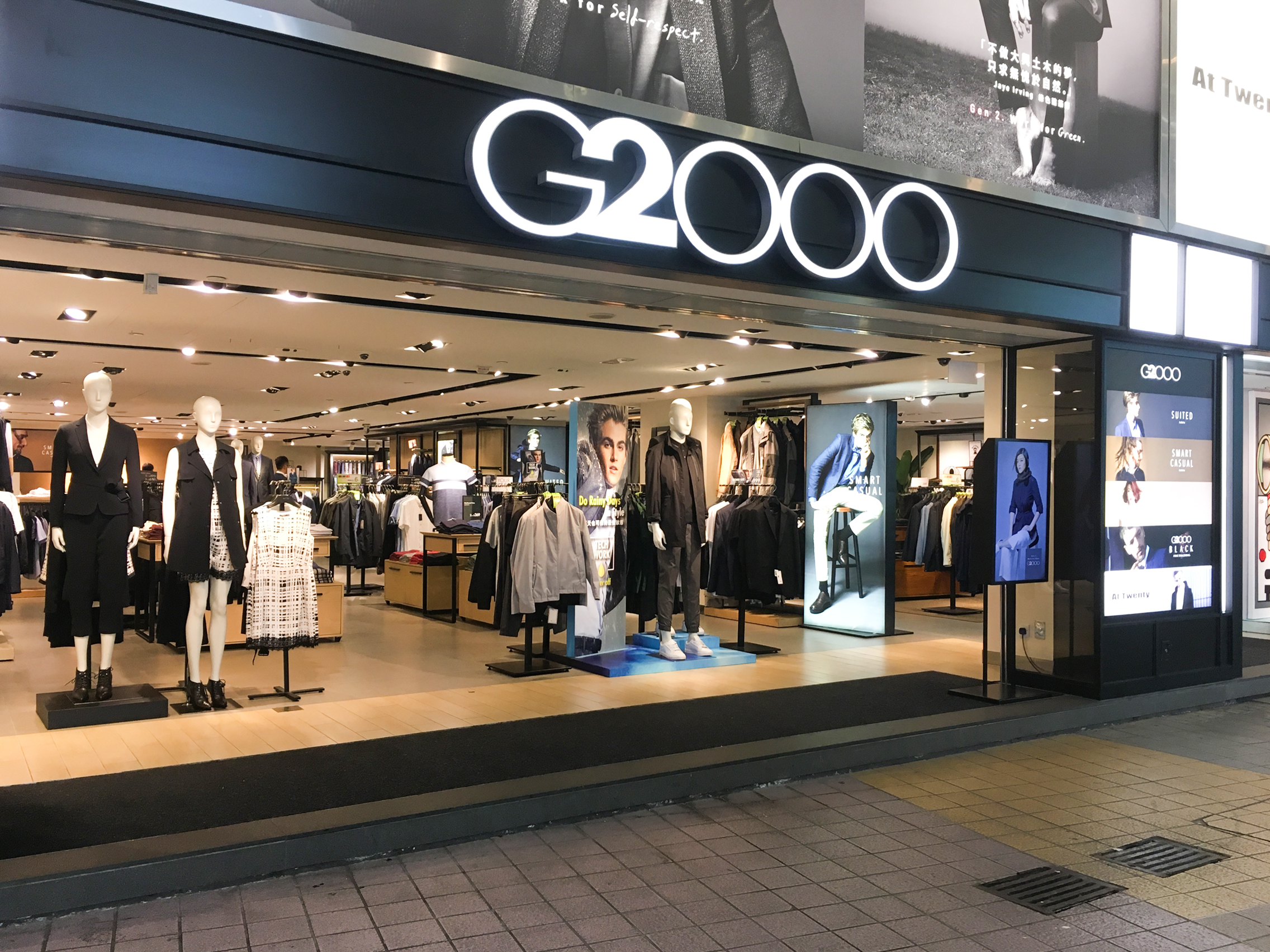 G2000 in Causeway Bay, Hong Kong